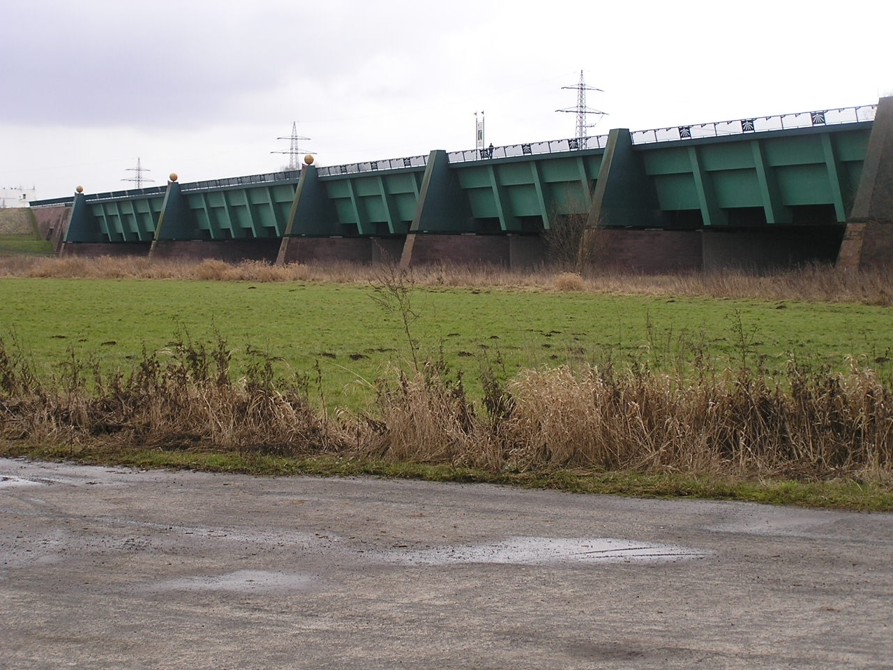 Die Neue Kanalbrücke am Wasserstraßenkreuz Minden in Minden, Nordrhein-Westfalen. Die Brücke führt den Mittellandkanal über die Weser. Ansicht von Norden. Für den Überbau aus dem Jahr 1993 wurde ein rechteckiger, stählerner Kanaltrog von 341 m Länge gewählt. Er überbrückt die sechs Flutöffnungen mit Stützweiten von je 36,50 m und die zwei Stromöffnungen mit Stützweiten von je 54,44 m. Die Stahlkonstruktion wiegt 7800 Tonnen. Die weiteren Abmessungen der neuen Brücke wurden durch die erforderlichen Querabschnittsabmessungen des Brückentroges von 42 m Wasserspiegelbreite und 4 m Wassertiefe und der Einhaltung eines Lichtraumprofils für die Weserschifffahrt (30 m Breite, 4,50 m Durchfahrtshöhe) bestimmt.